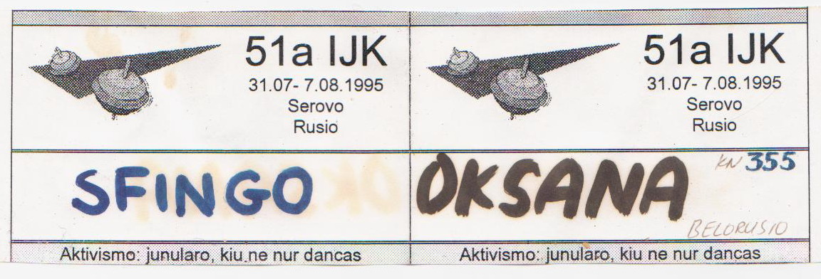 Porpersona ŝildo de 51a IJK de 1995 en urbo Serovo (Rusio)